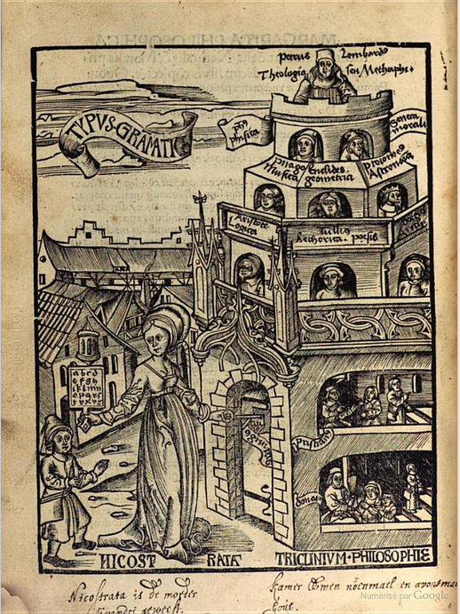 Margarita philosophica de Gregor Reisch (1504). Google Books